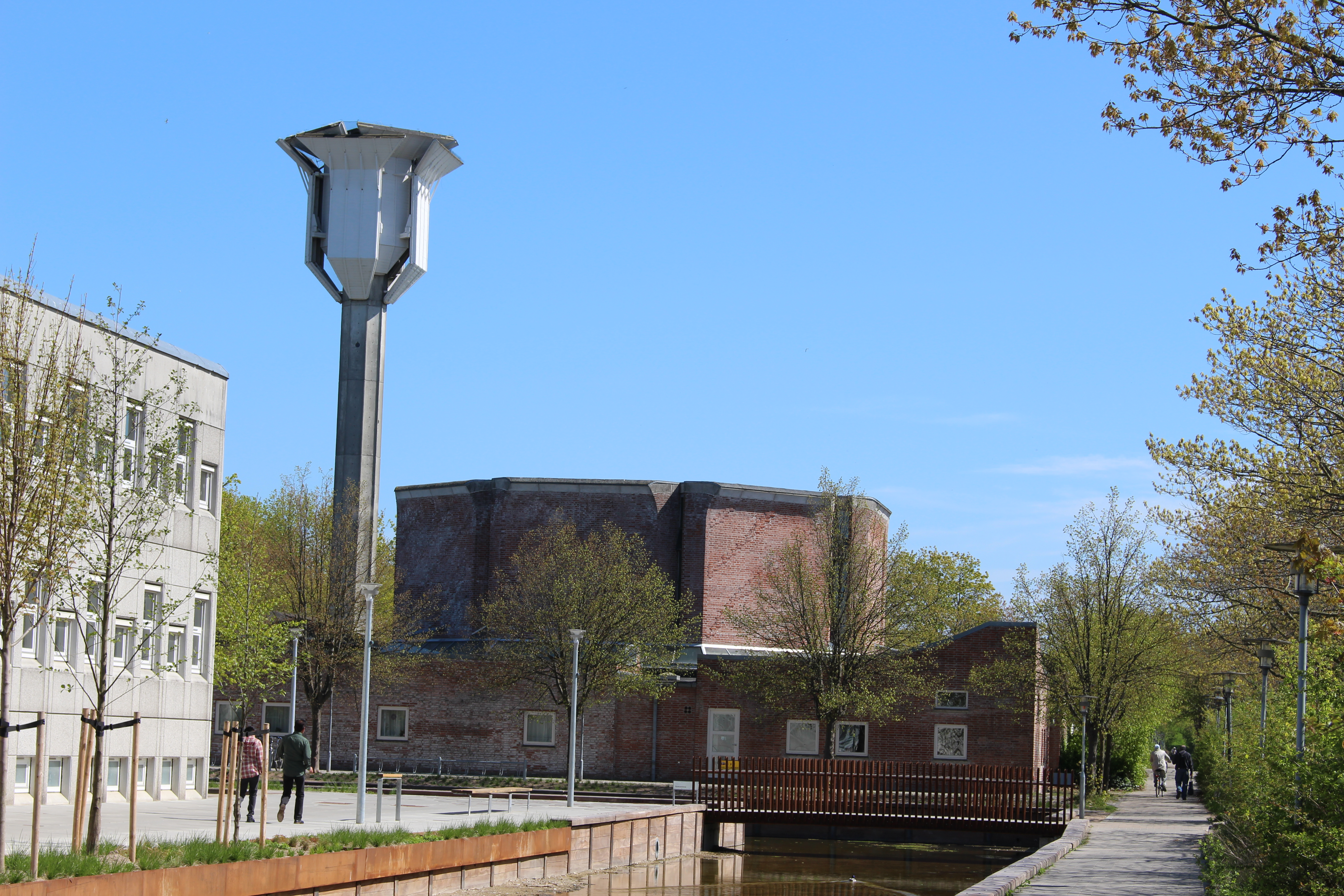 Opstandelseskirken i Albertslund